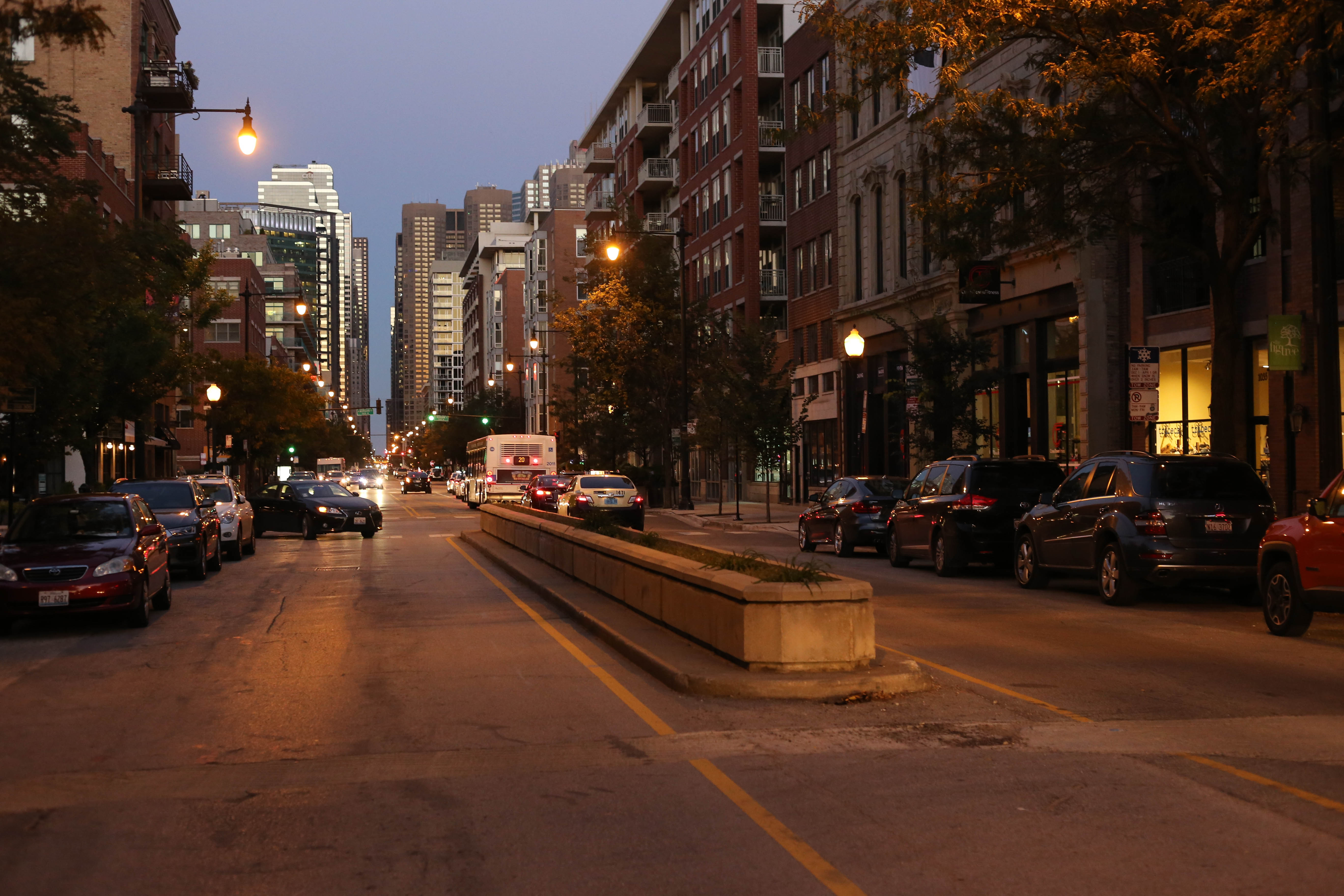 West Loop